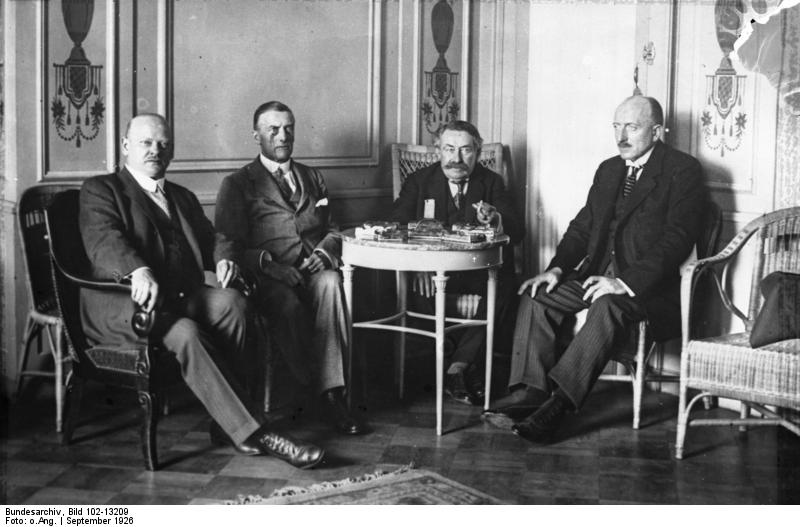 Aristide Briand der bekannte französische Aussenminister ist im Alter von 70 Jahren gestorben! Briand mit den bekanntesten Aussenministern der Welt, Dr. Stresemann und dem englischen Aussenminister Chamberlain bei einer Zusammenkunft in Genf.